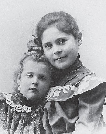 Сёстры Лили и Эльза Каган (Лиля Брик и Эльза Триоле). около 1900 годп